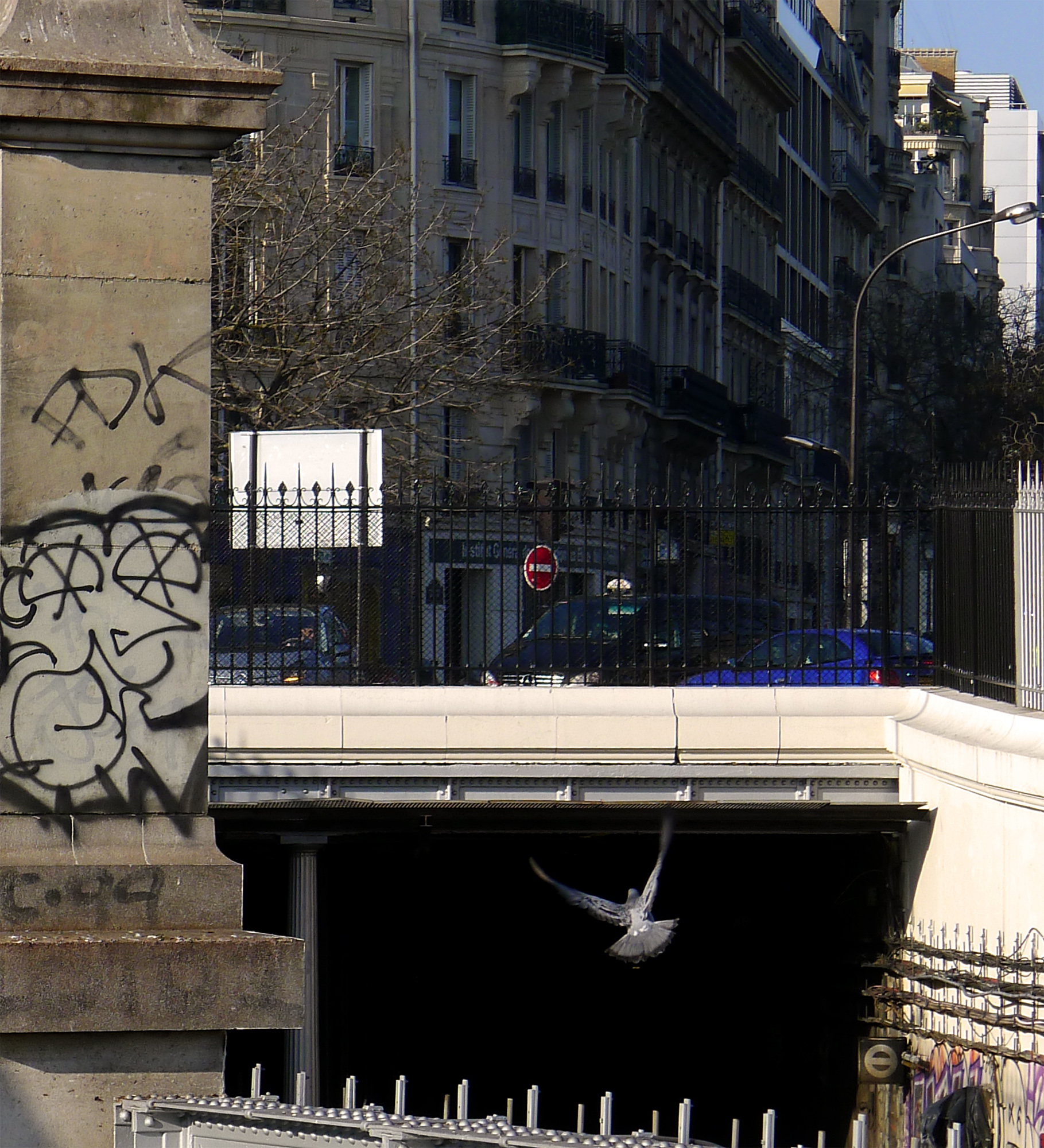 Ligne N°5 du métro (entrée dans la partie souterraine du bd Bourdon) - Paris IV